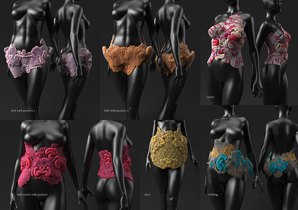 Render del proyecto titulado Wanderers Envornments creado por la Dra. Neri Oxman.